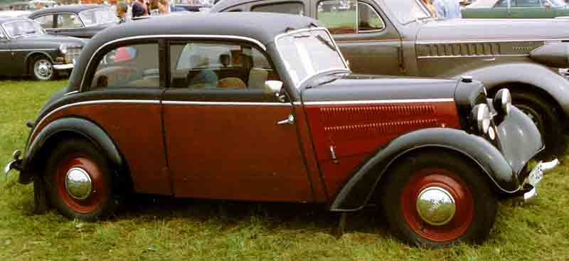 DKW Limousine